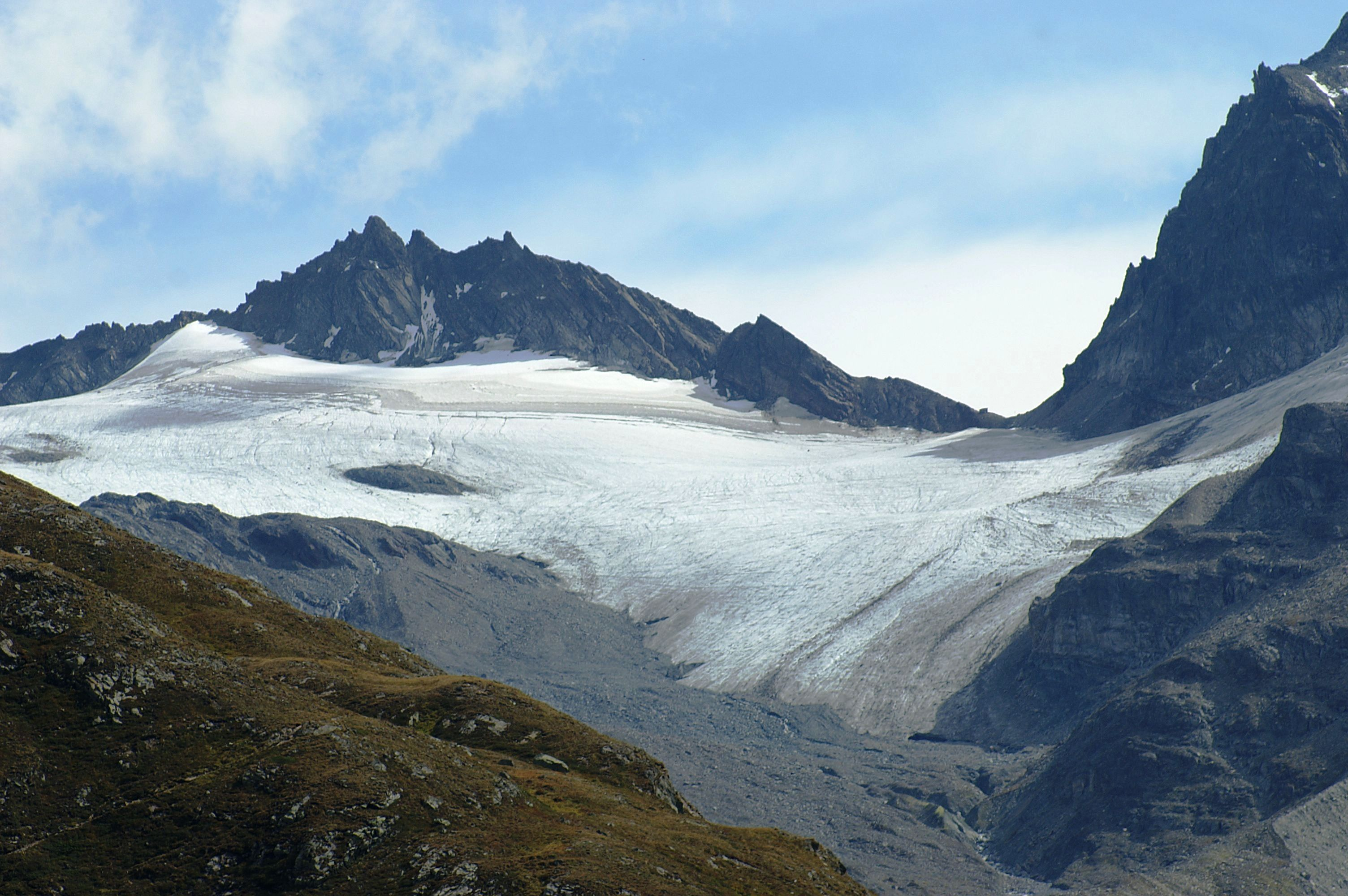 Silvretta, mit dem höchsten Berg Vorarlbergs der Piz Buin 3312m mit seinen Gletschern. Blick vom Silvretta-Stausee